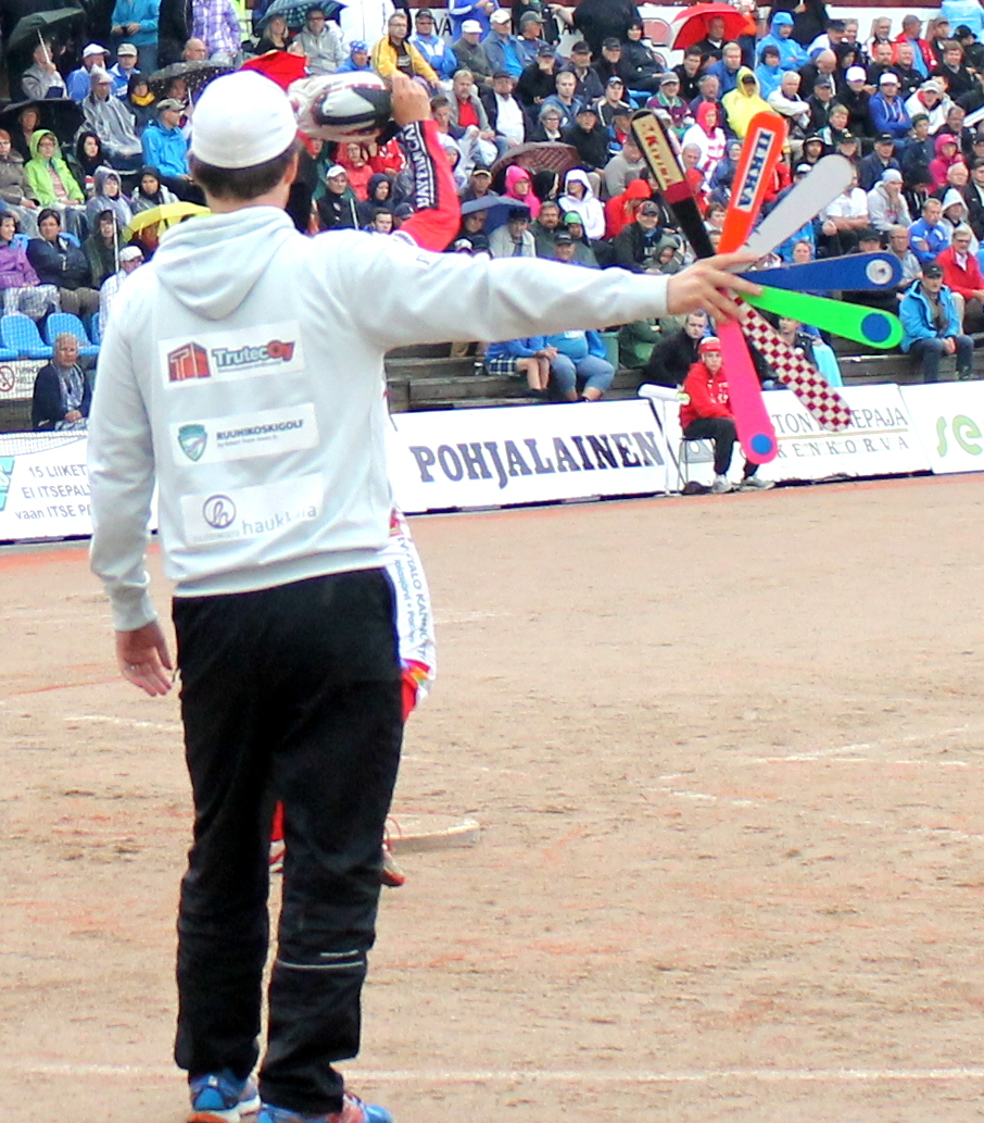 JymyJussien pelinjohtaja Sami-Petteri Kivimäki elokuussa 2013